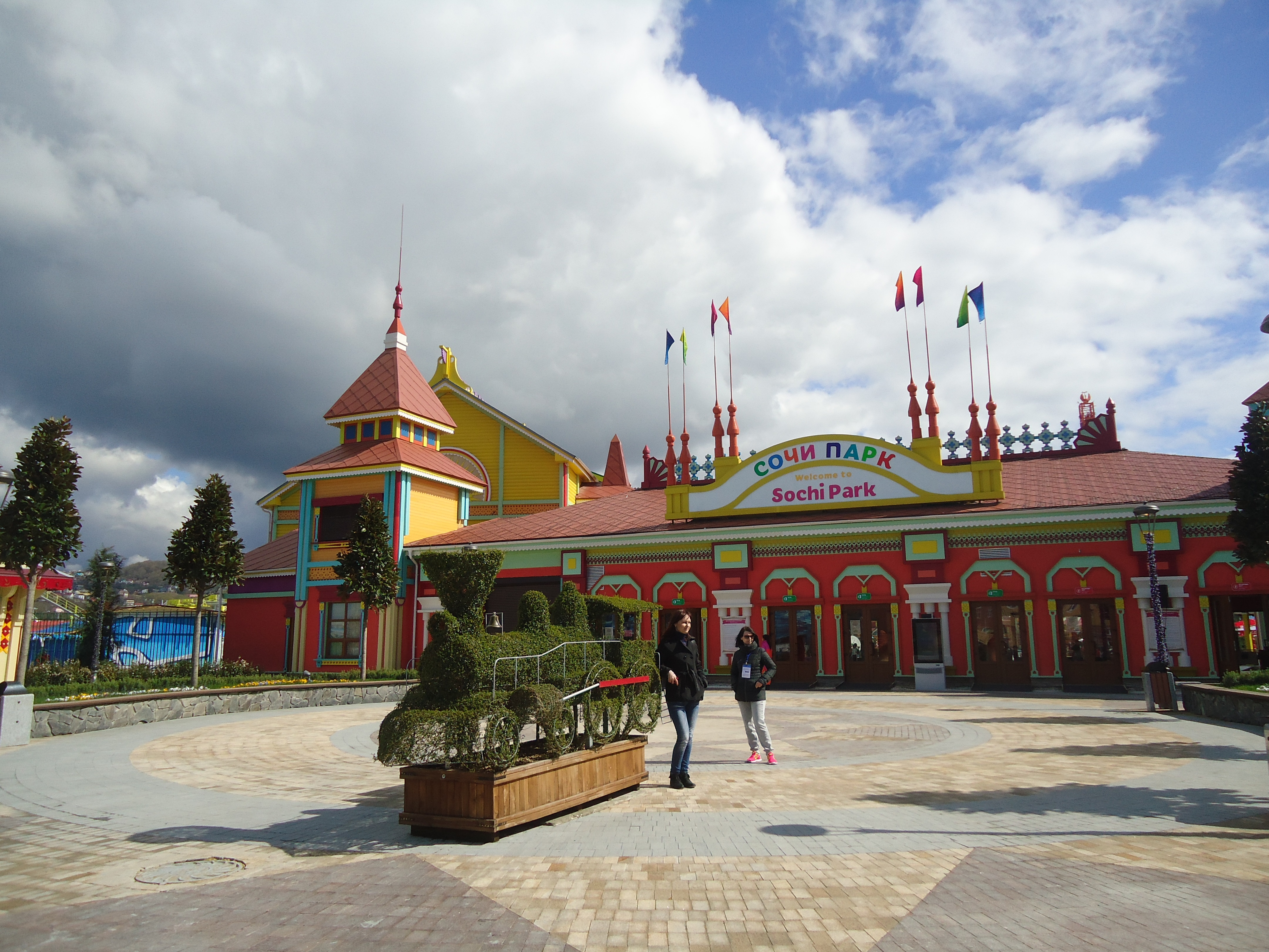 Сочи парк на территории Олимпийского парка Адлере